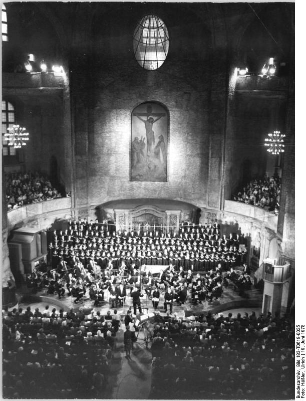 Dresden, Kreuzkirche, Chöre ADN-ZB Häßler 19.6.1978 Dresden: Zu einem musikalischen Ereignis gestaltete sich die gemeinsame Aufführung der Hohen Messe in h-moll von Johann Sebastian Bach durch den Dresdner Kreuzchor und den Leipziger Thomanerchor. Die beiden berühmten Knabenchöre führten dieses Werk am 17. und 18.6.1978 in Leipzig und am 15. und 16.6.1978 in der Dresdner Kreuzkirche (Foto) auf. Das Konzert wurde vom Fernsehen der DDR aufgezeichnet.